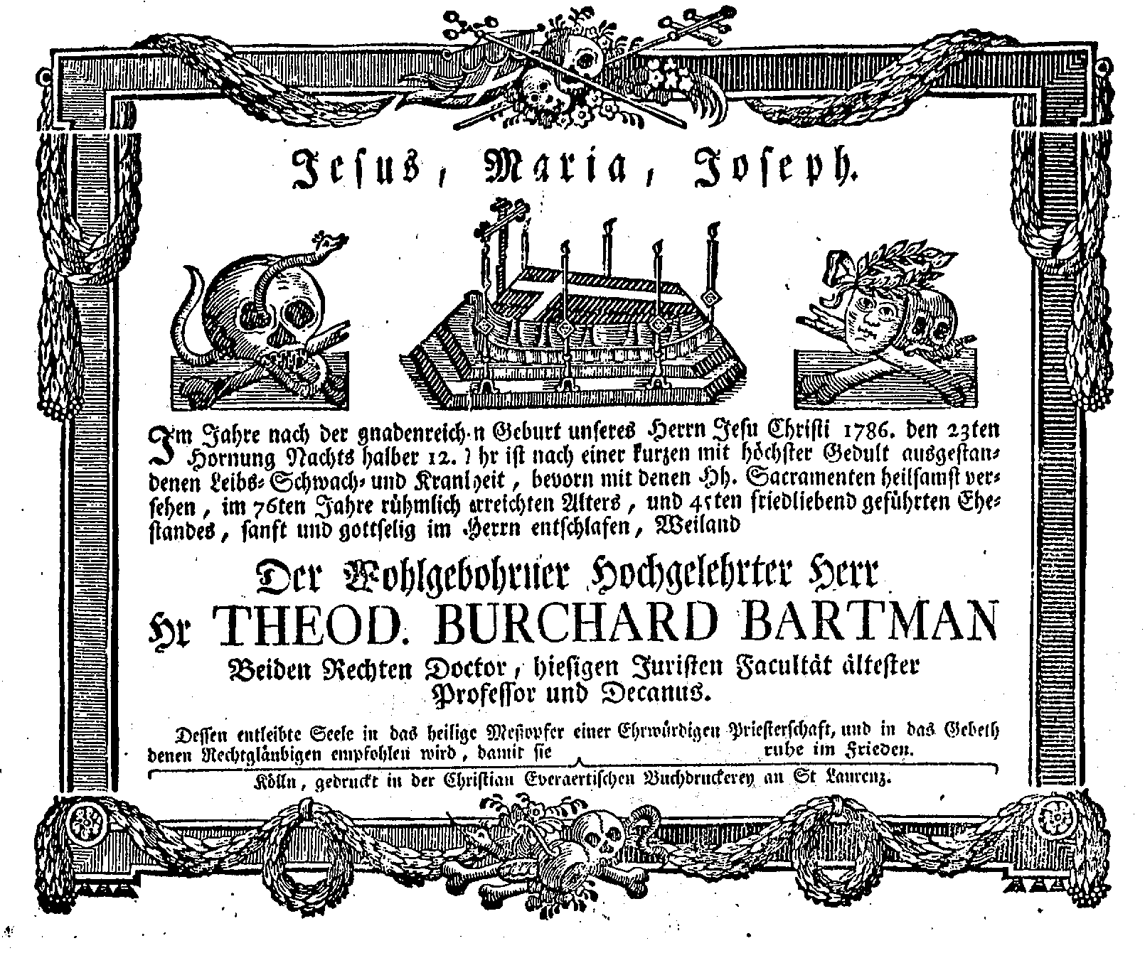 Totenzettel 1786 Theod. Burchard Bartman , Köln